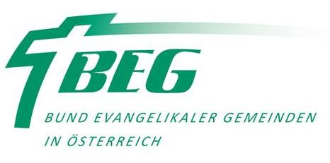 Logo des Bundes Evangelikaler Gemeinden in Österreich